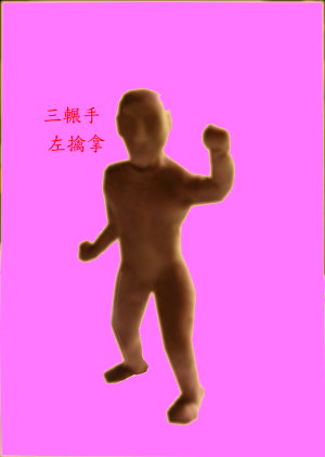 左擒拿